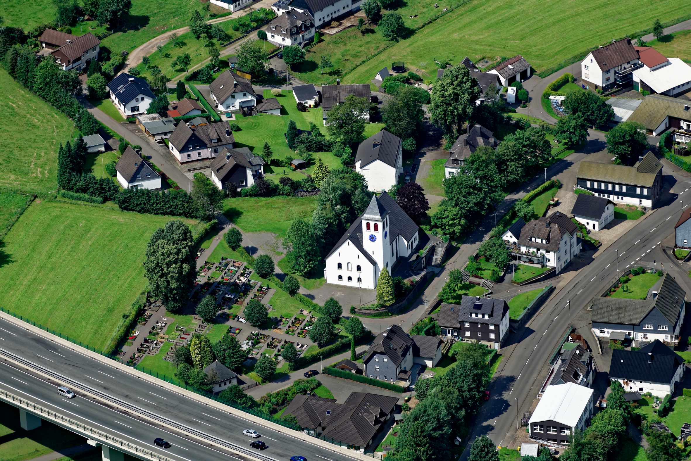 Luftaufnahme: Drolshagener Ortsteil Bleche mit katholischer St.-Josef-Kirche und Friedhof; Bundesautobahn 45; Bundesstraße 54, Nordrhein-Westfalen.